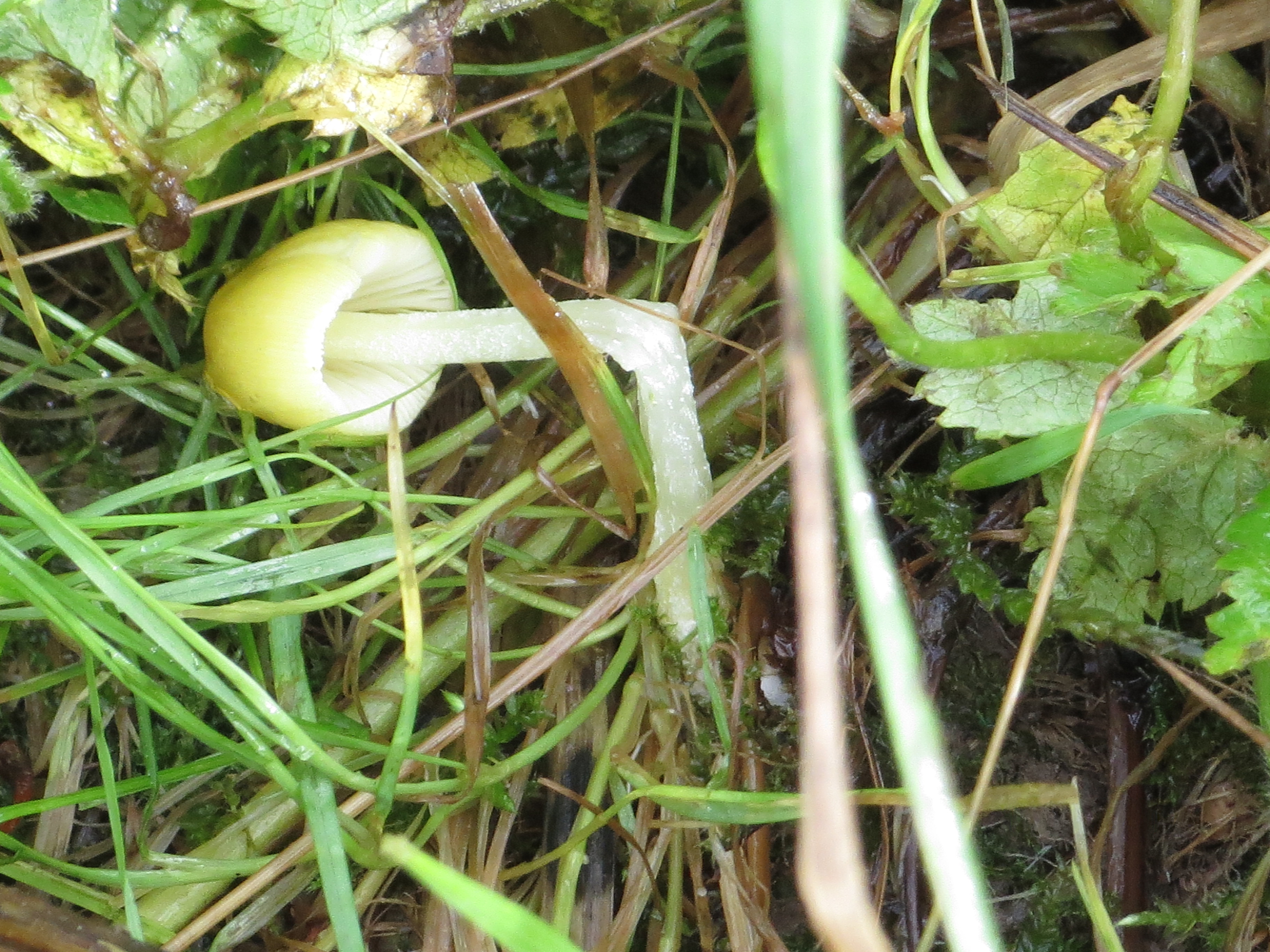 Keltahäiväkkä